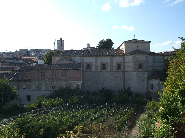 Huerta y parte posterior del convento de la Concepción de Cuéllar